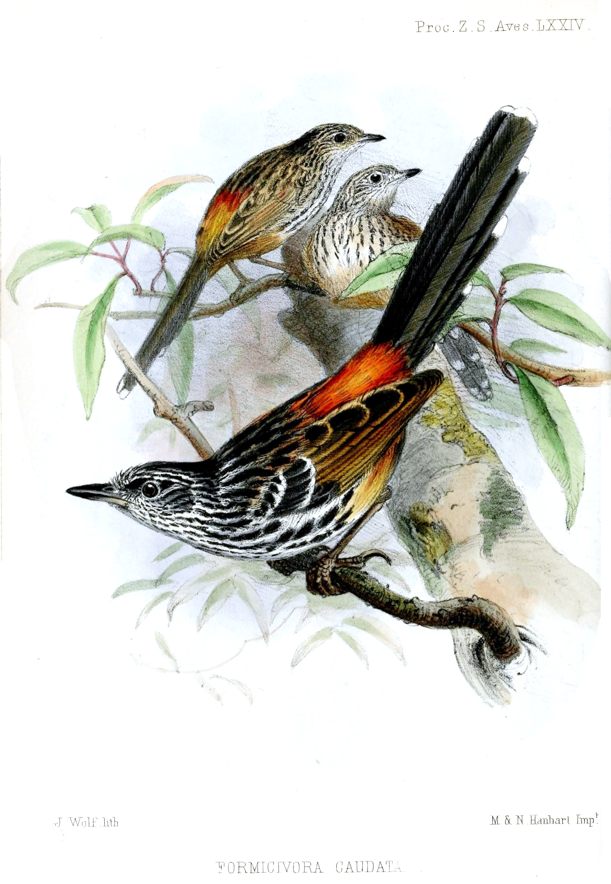 Formicivora caudata = Drymophila caudata